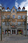 Facaden på